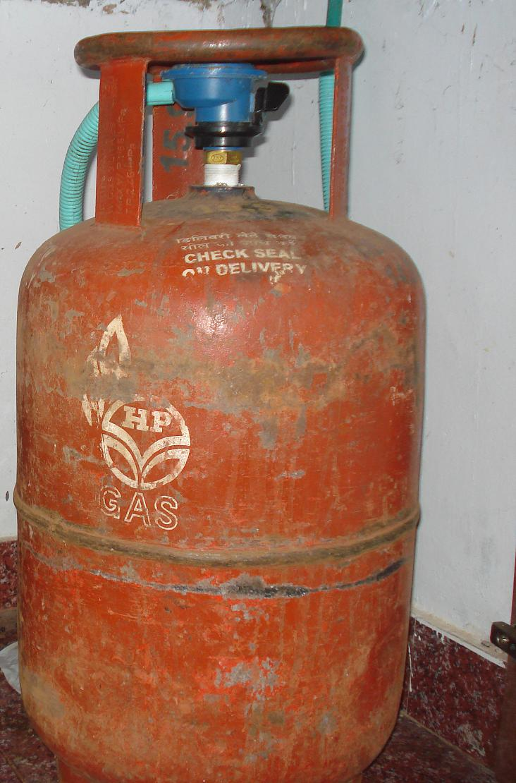 അടുക്കളയിൽ ഉപയോഗിക്കുന്ന പാചക വാതക സിലിണ്ടർ